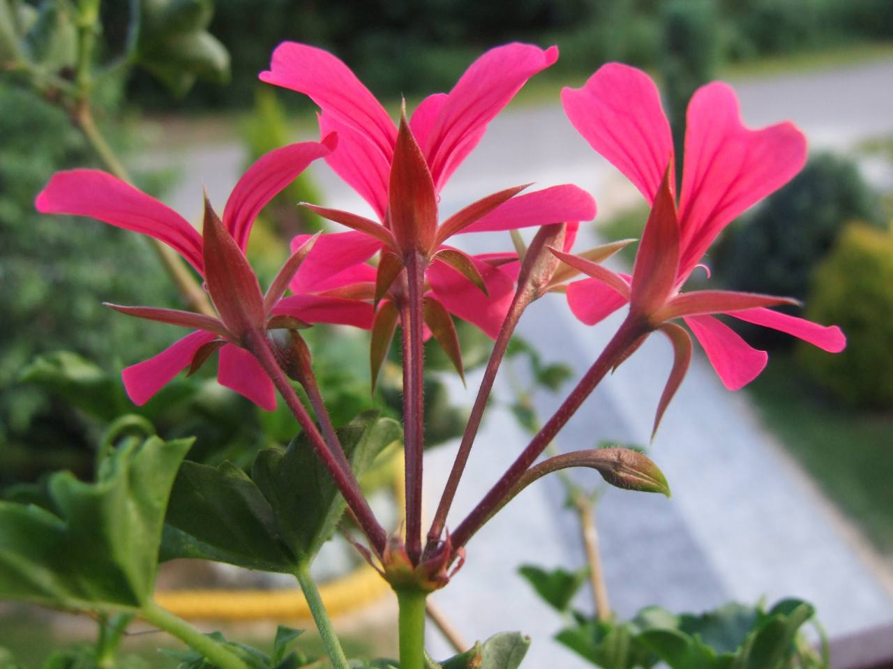 Pelargonium peltatum hortum